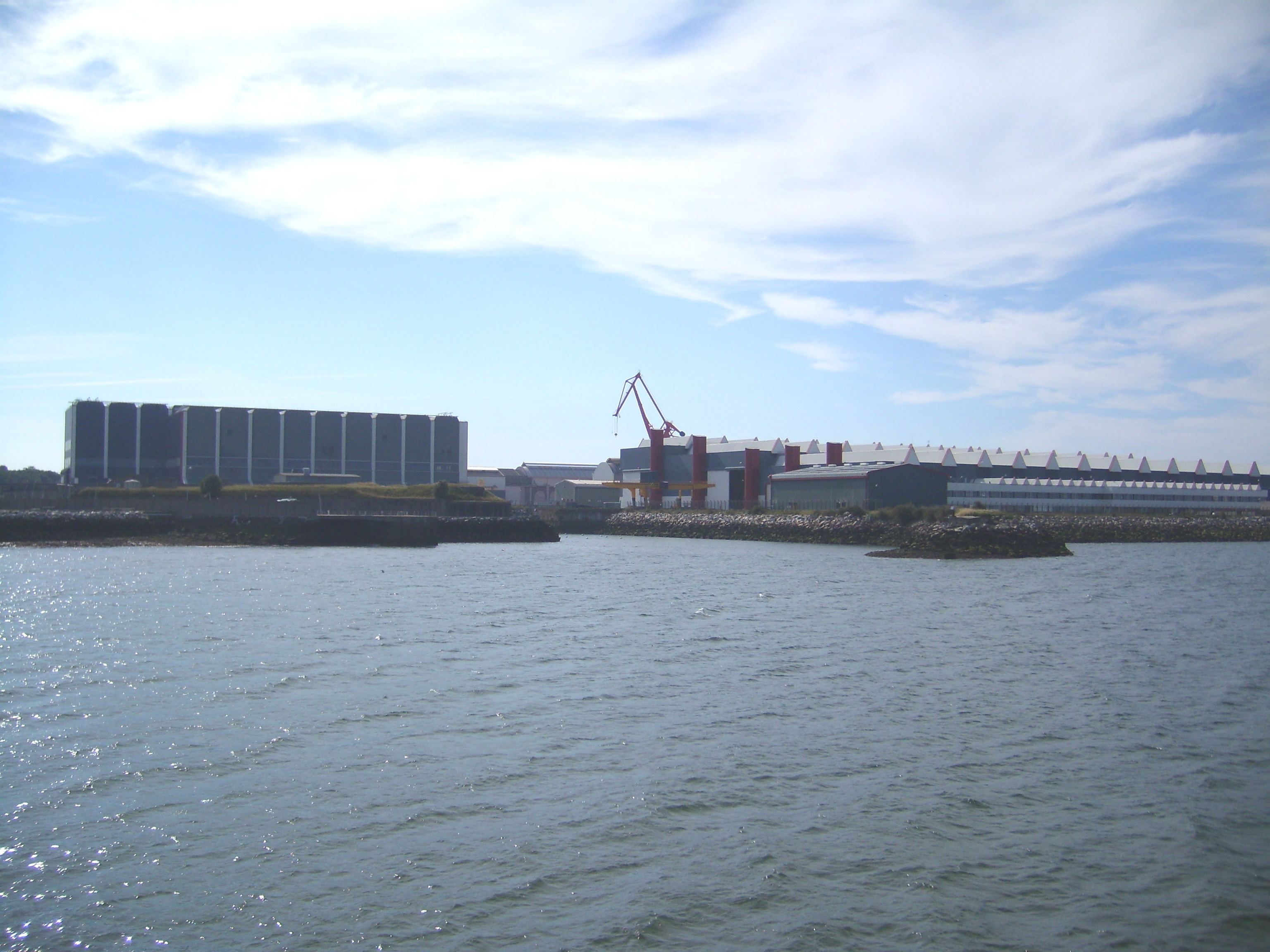 Les Hangars de l'arsenal de la DCNS, port militaire de Cherbourg